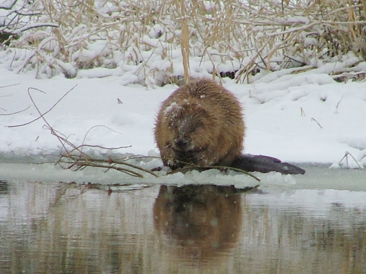 Winter 2014 an der Peene Buschmähns Welt Km32